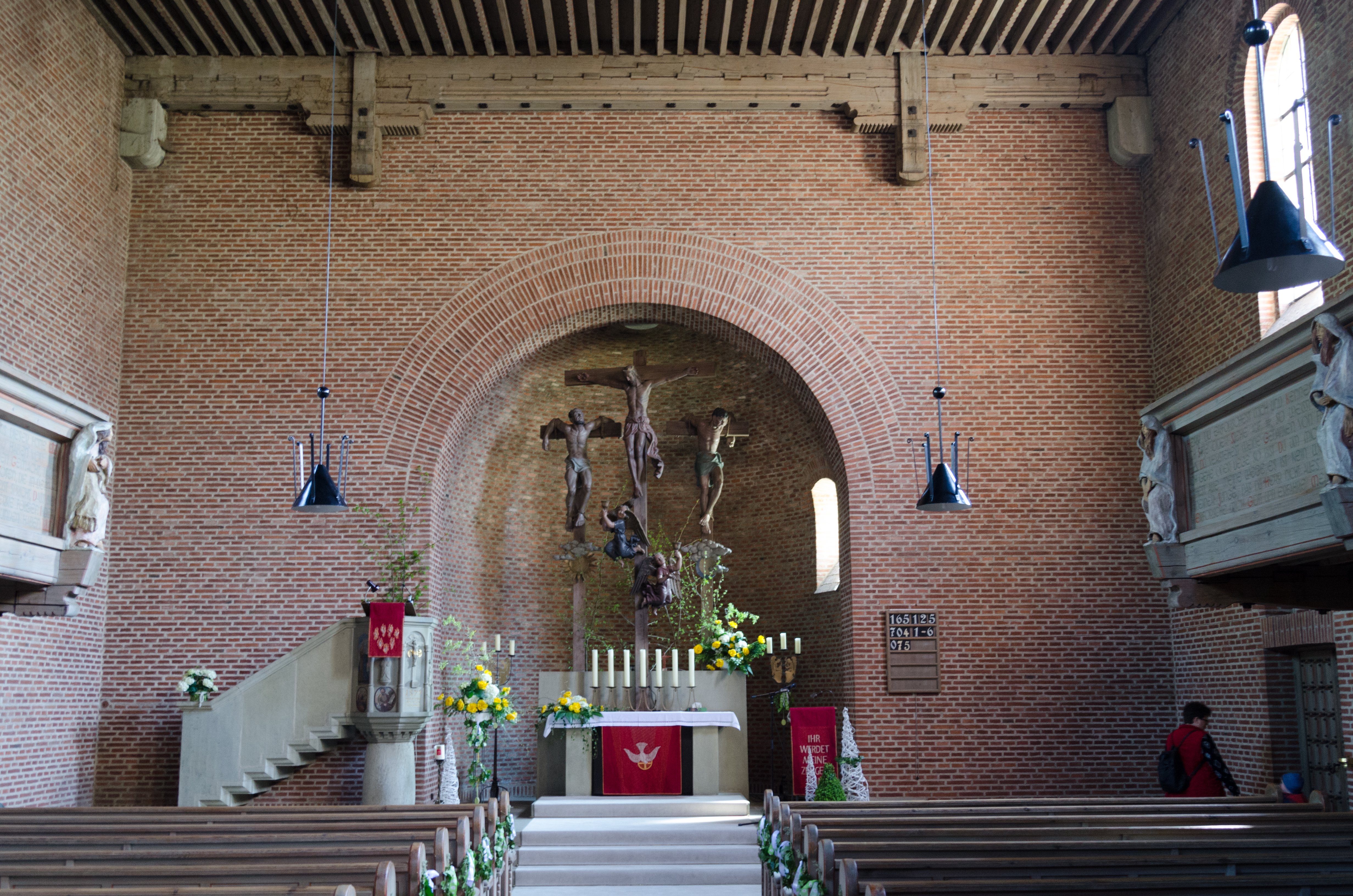 Schweinfurt Oberndorf, Kreuzkirche